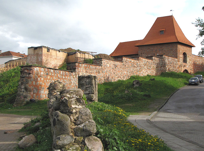 Беларуская (тарашкевіца): Частка віленскага муру